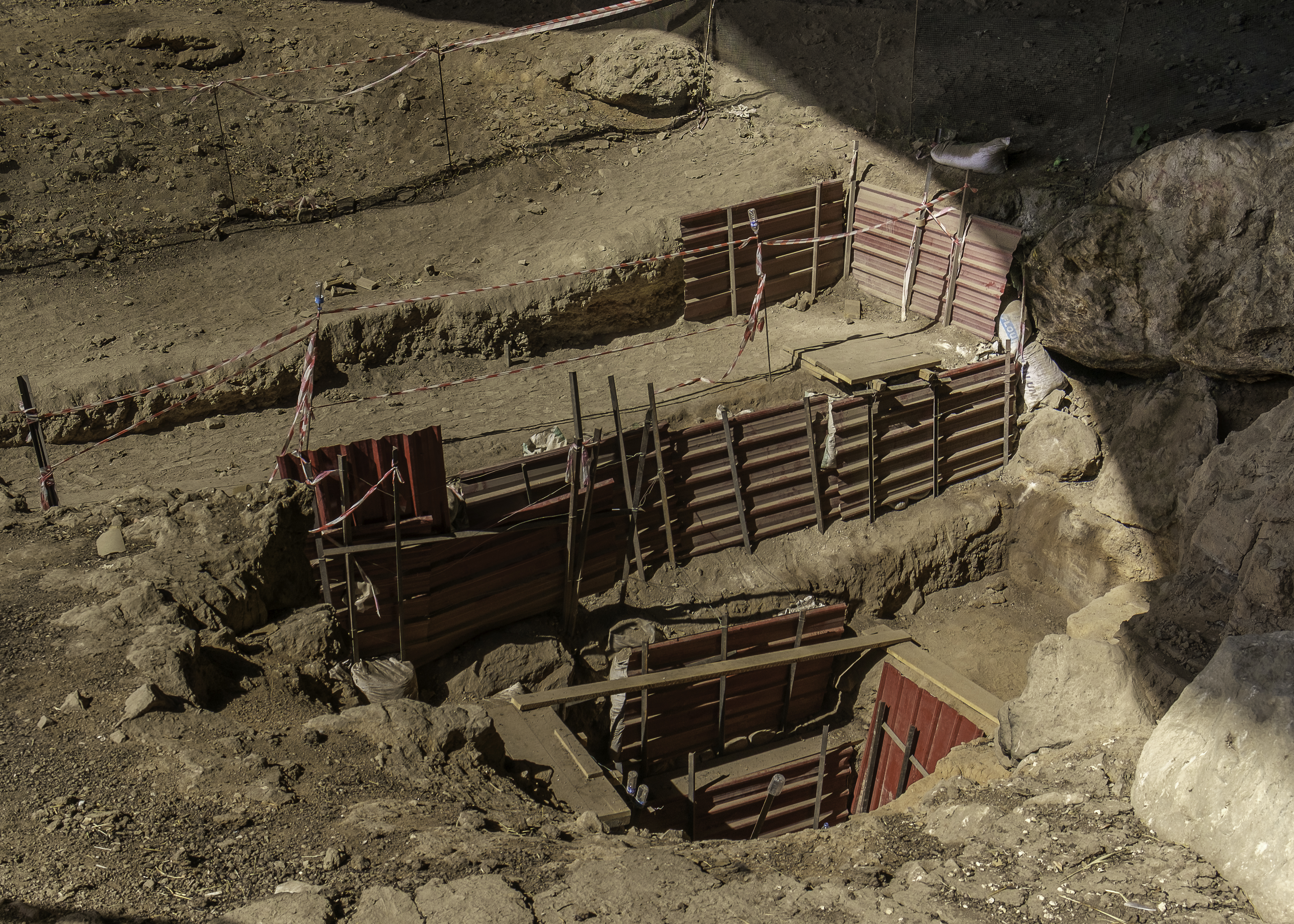 Excavations in Shanidar Cave